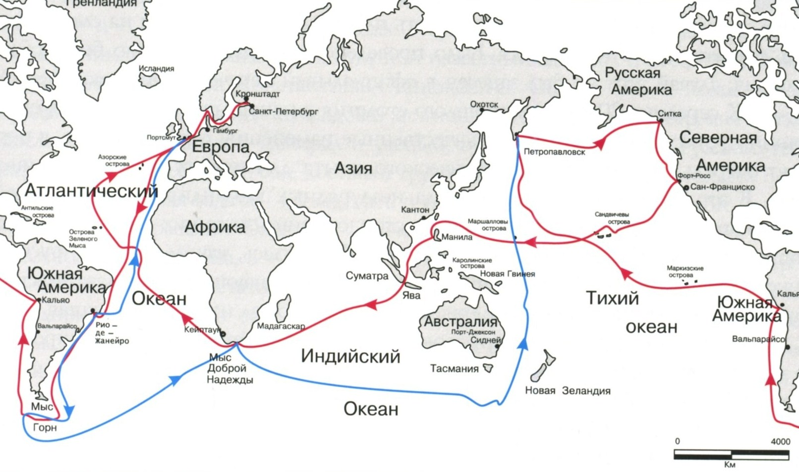 Карта плаваний В.М.Головнина